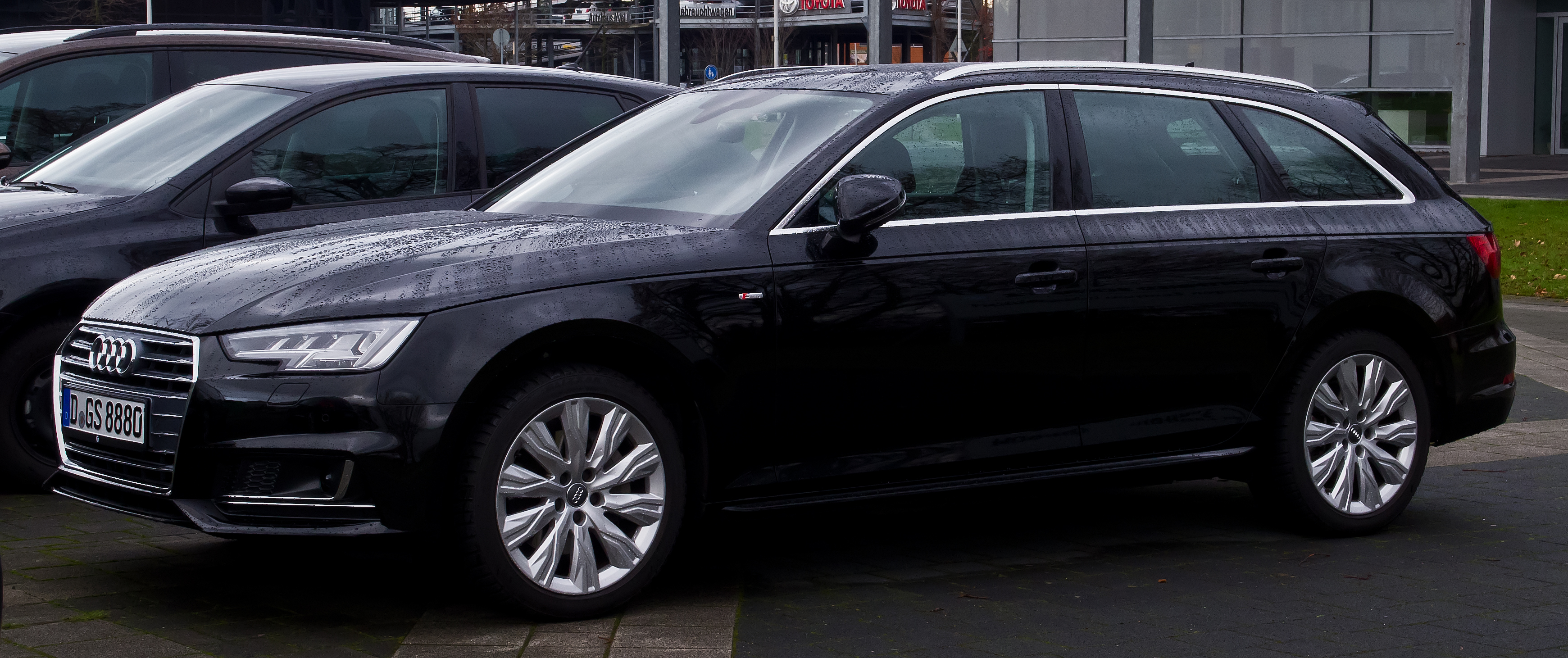 Audi A4 Avant 3.0 TDI S-line (B9)